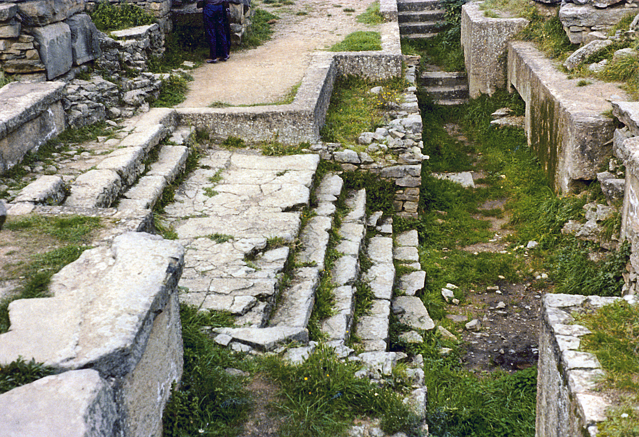 Fiesole (Toskana, Italien) - Archäologische Zone - etruskisch-römischer Tempel. Im Bild ist der unter dem römischen Überbau erhalten gebliebene Treppenaufgang des etruskischen Vorgängerbaus zu sehen.